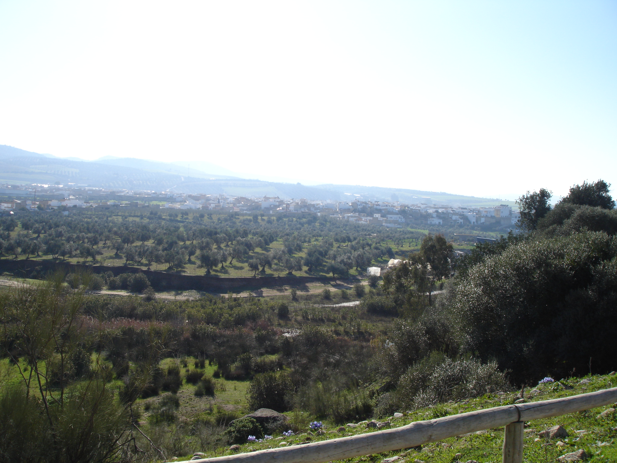 Vista de Puerto Serrano desde la Vía Verde